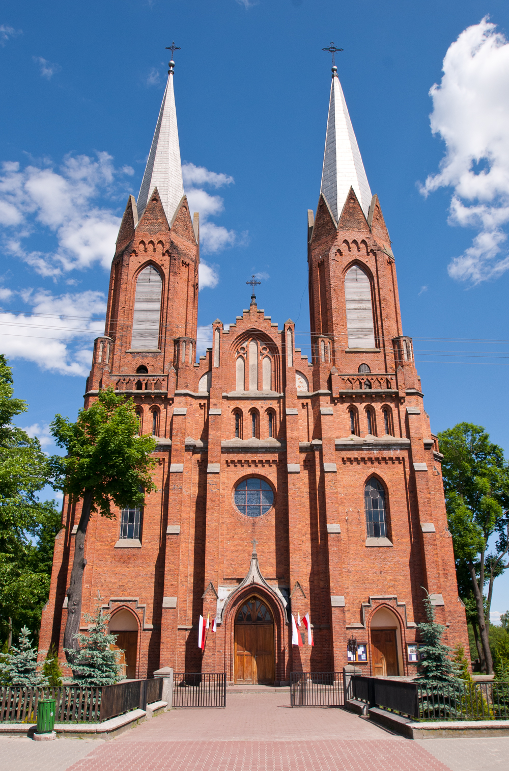 kościół par., 1893-1913 Odrzywół, ul.Kościelna 2, Odrzywół